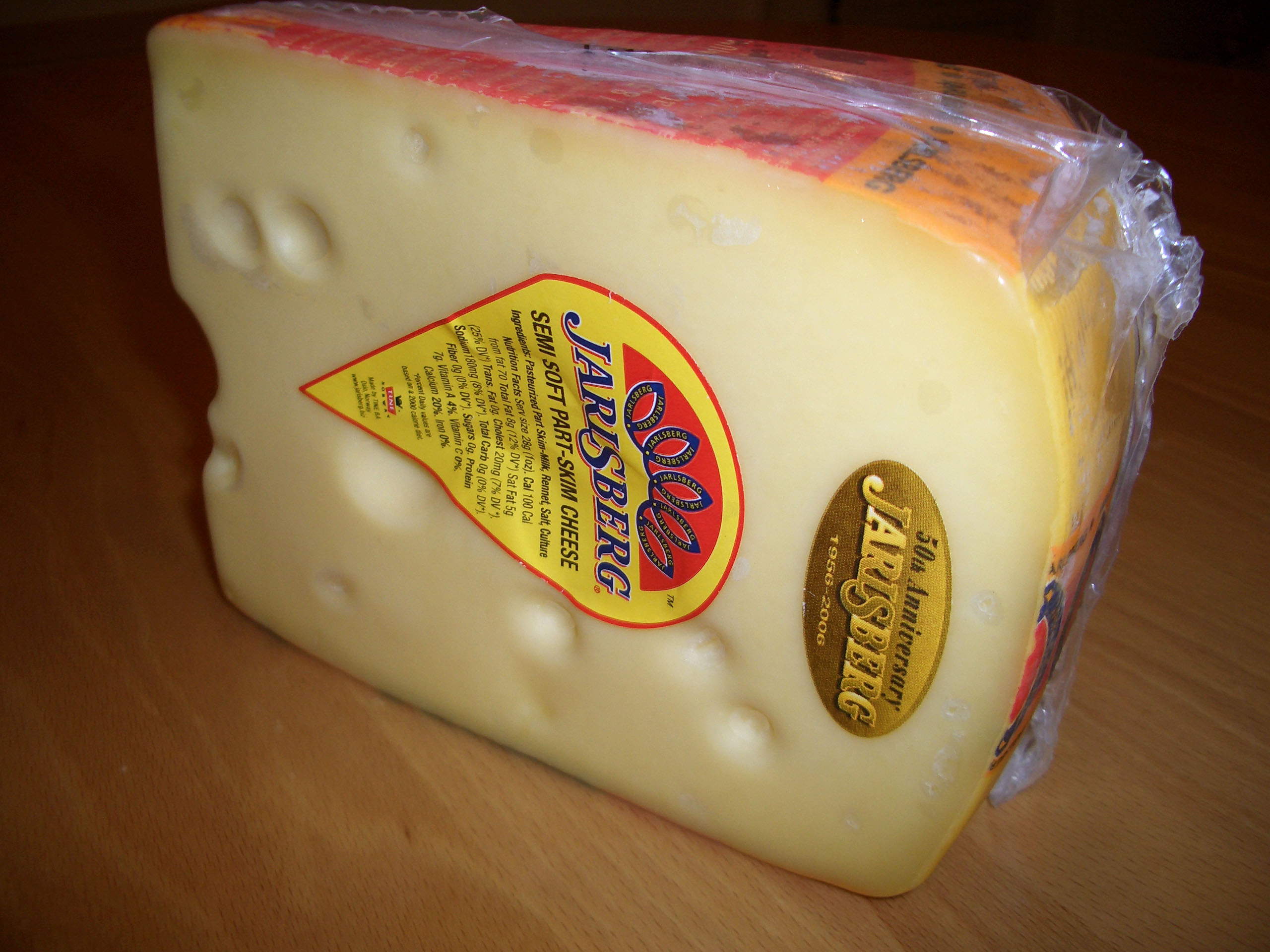 Jarlsberg cheese